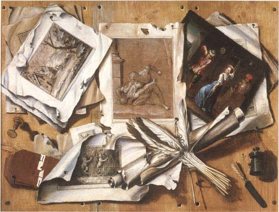 Trampantojo, firmado "Gallardo f. et ynvenit", óleo sobre lienzo, 63,5 x 85 cm, Madrid, colección particular